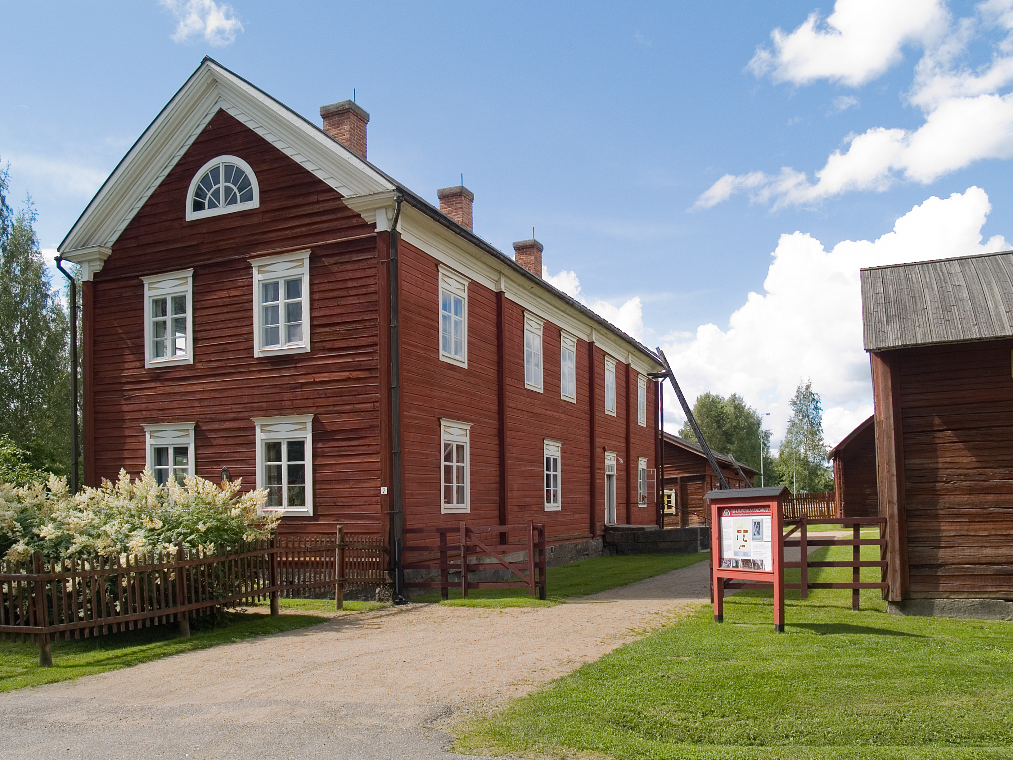 Yli-Lauroselan talomuseo, Ilmajoki.